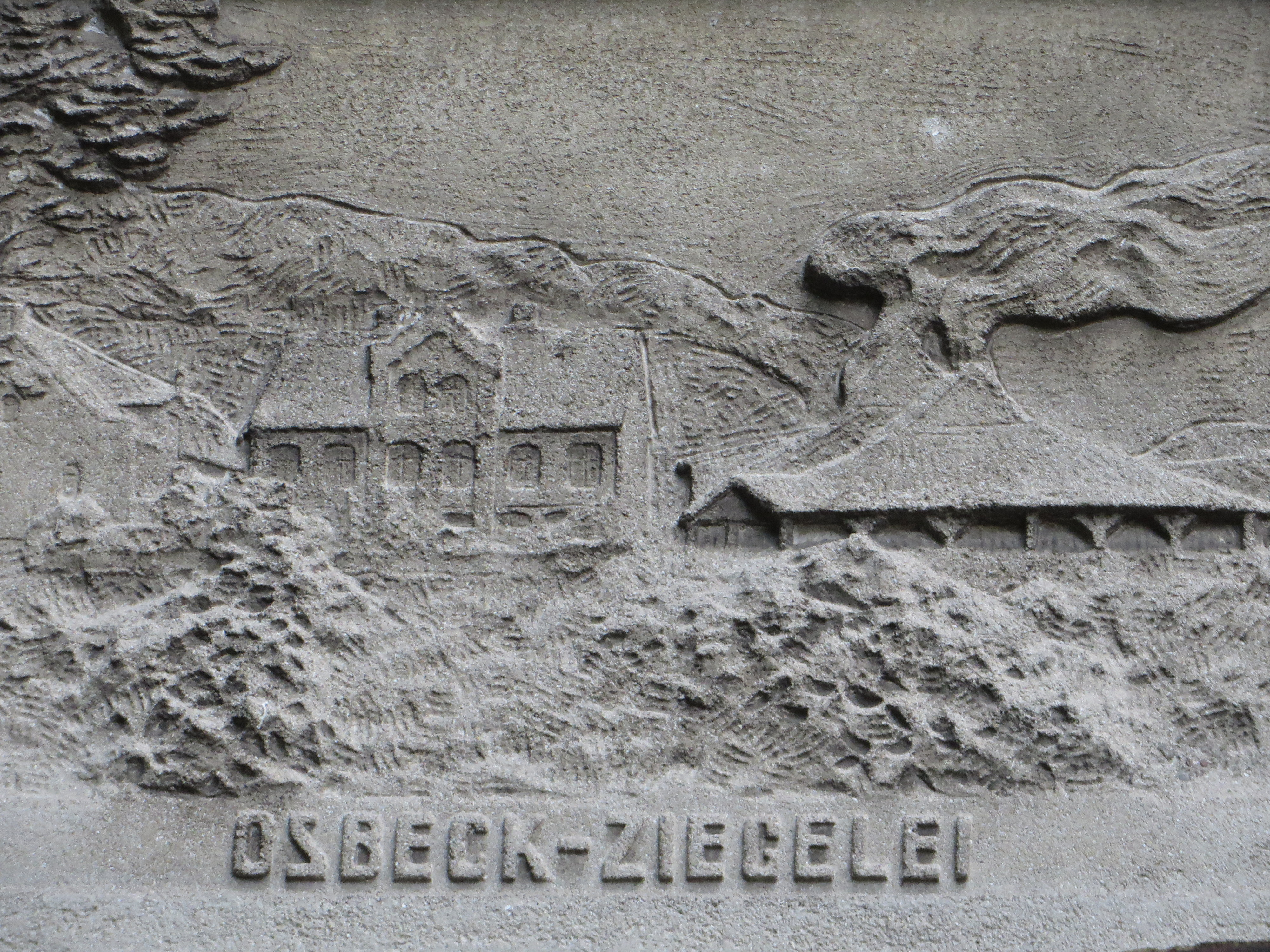 Relief Osbeck-Ziegelei, Bild 04